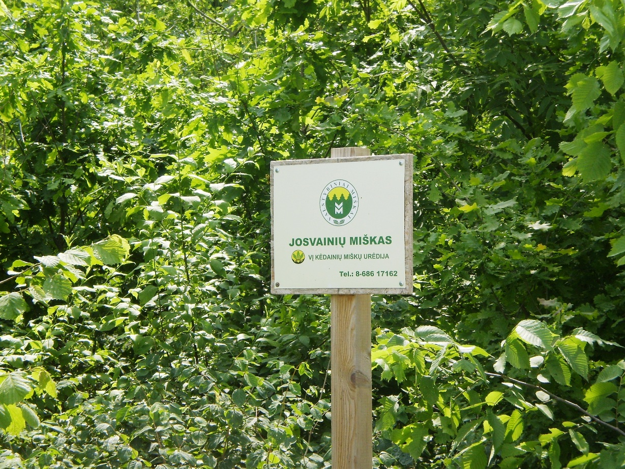 Josvainių miško ženklas ties Palainiškiais, Kėdainių raj.